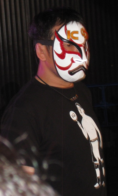 2013年6月22日 大阪大会 「DOMINION6.22」 桜庭和志